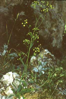 Sicilian botanical endemisms Bupleurum elatum